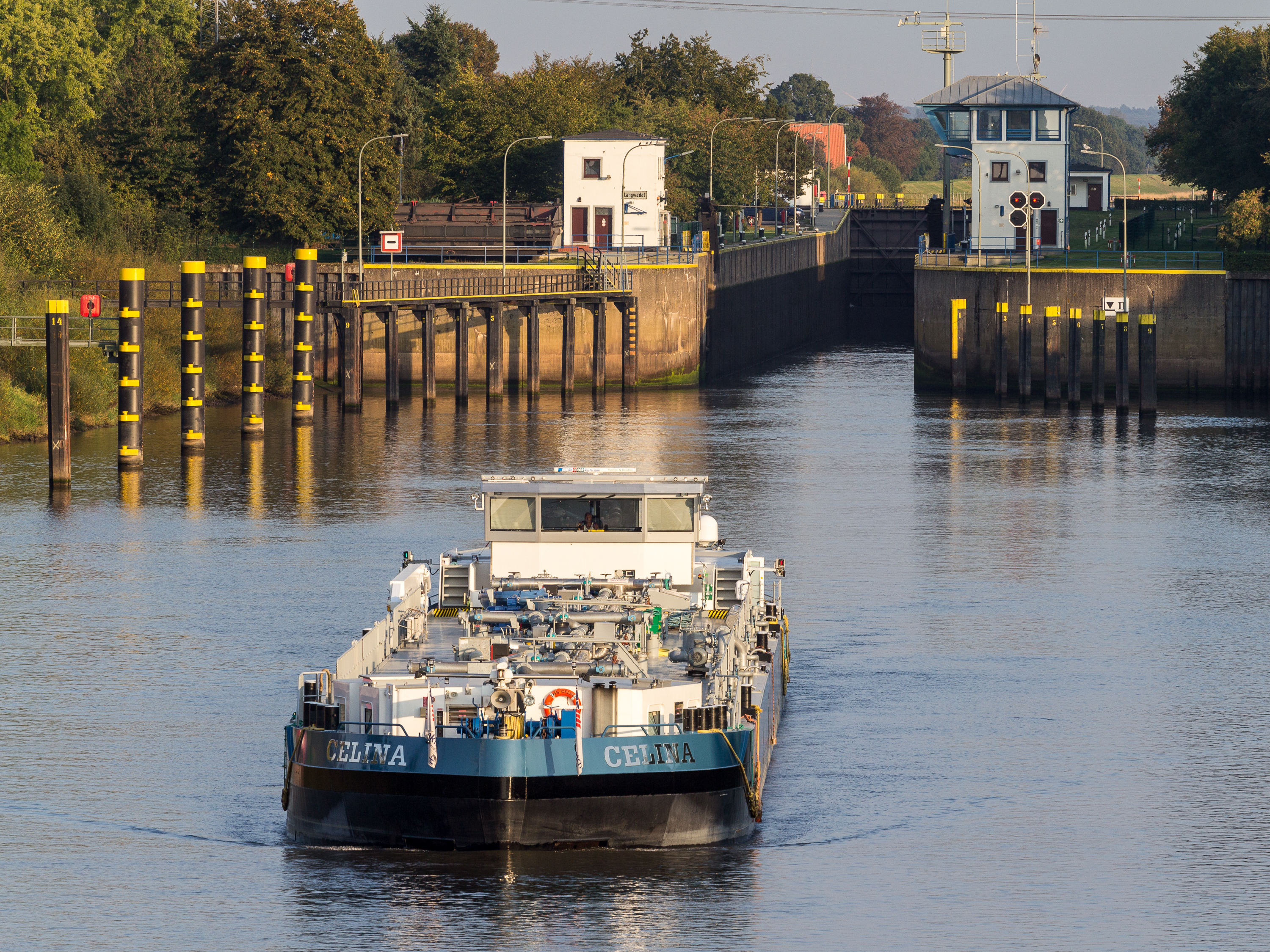 Weser-Schleusenkanal mit Schleuse Langwedel